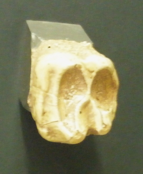 Fossil of Barytherium, an extinct proboscidean- Took the photo at Senckenberg Museum of Frankfurt